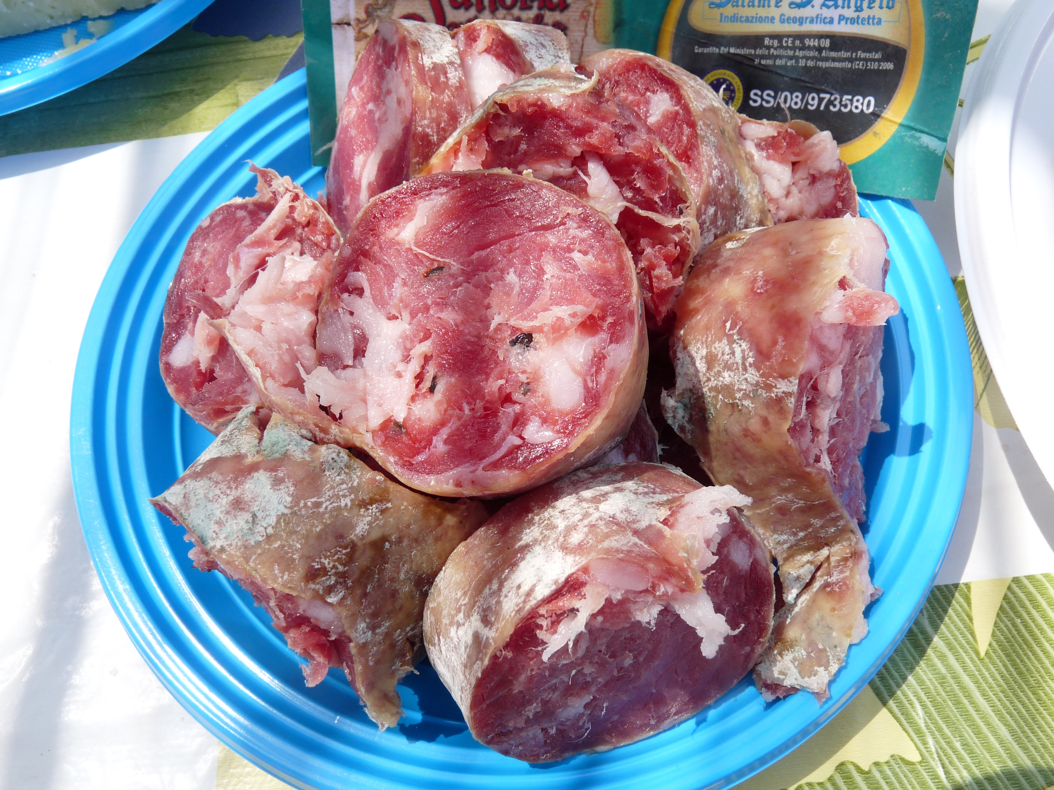 Saucisson Salame Sant'Angelo de Sicile (Indication géographique protégée)